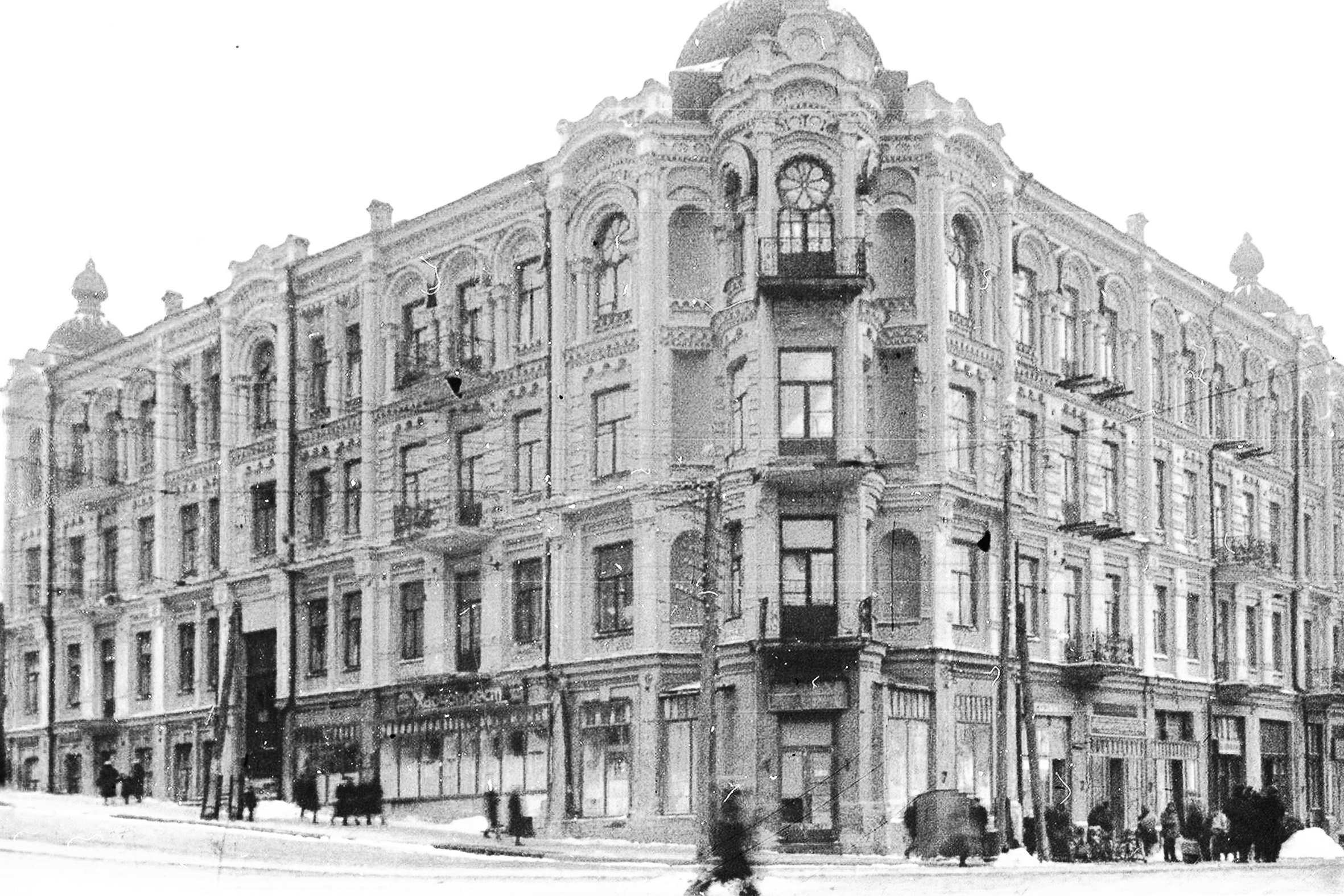 Готель «Пале-Рояль» і прибутковий будинок, Київ, Басейна вулиця, 1/2